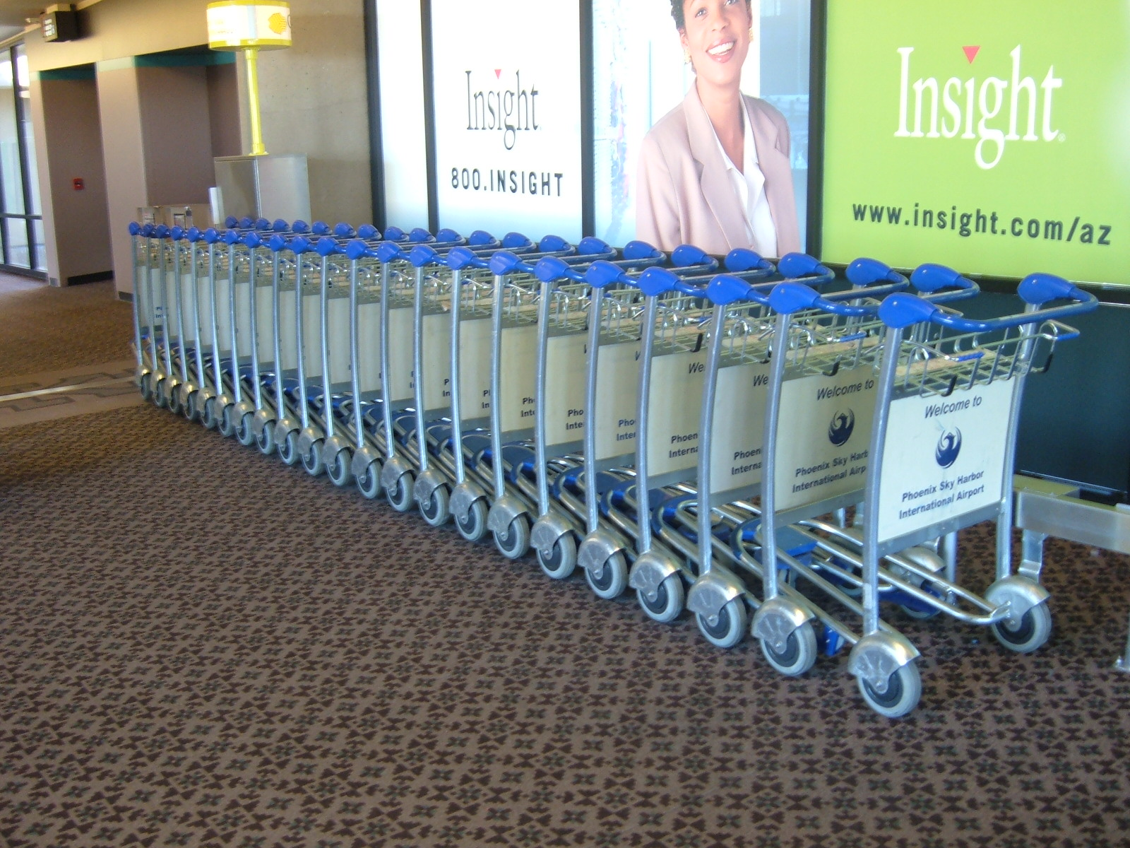 Wanzl-Gepäcktransportwagen am Flughafen Phoenix